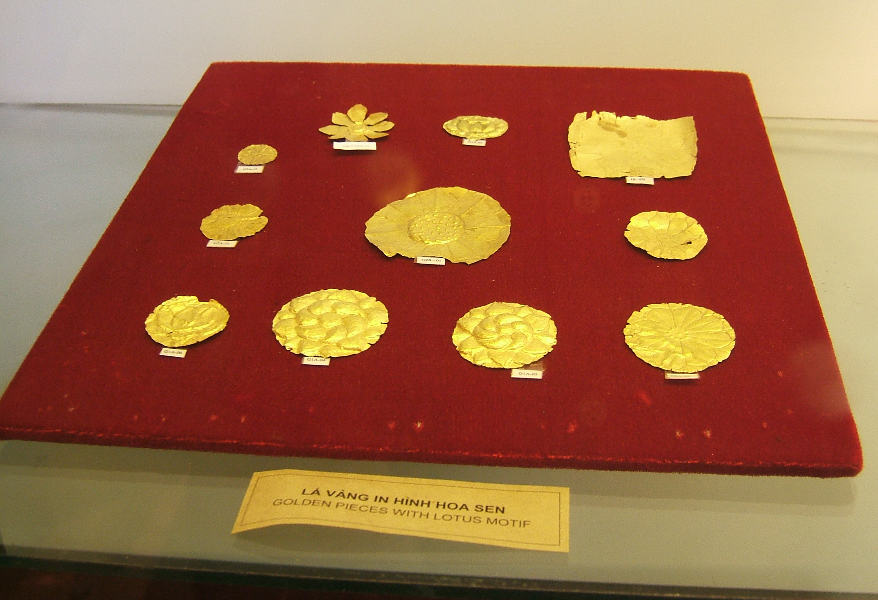 Khương Việt Hà chụp lại từ Viện Bảo tàng Lịch sử Việt Nam ngày 21 tháng 10 năm 2007